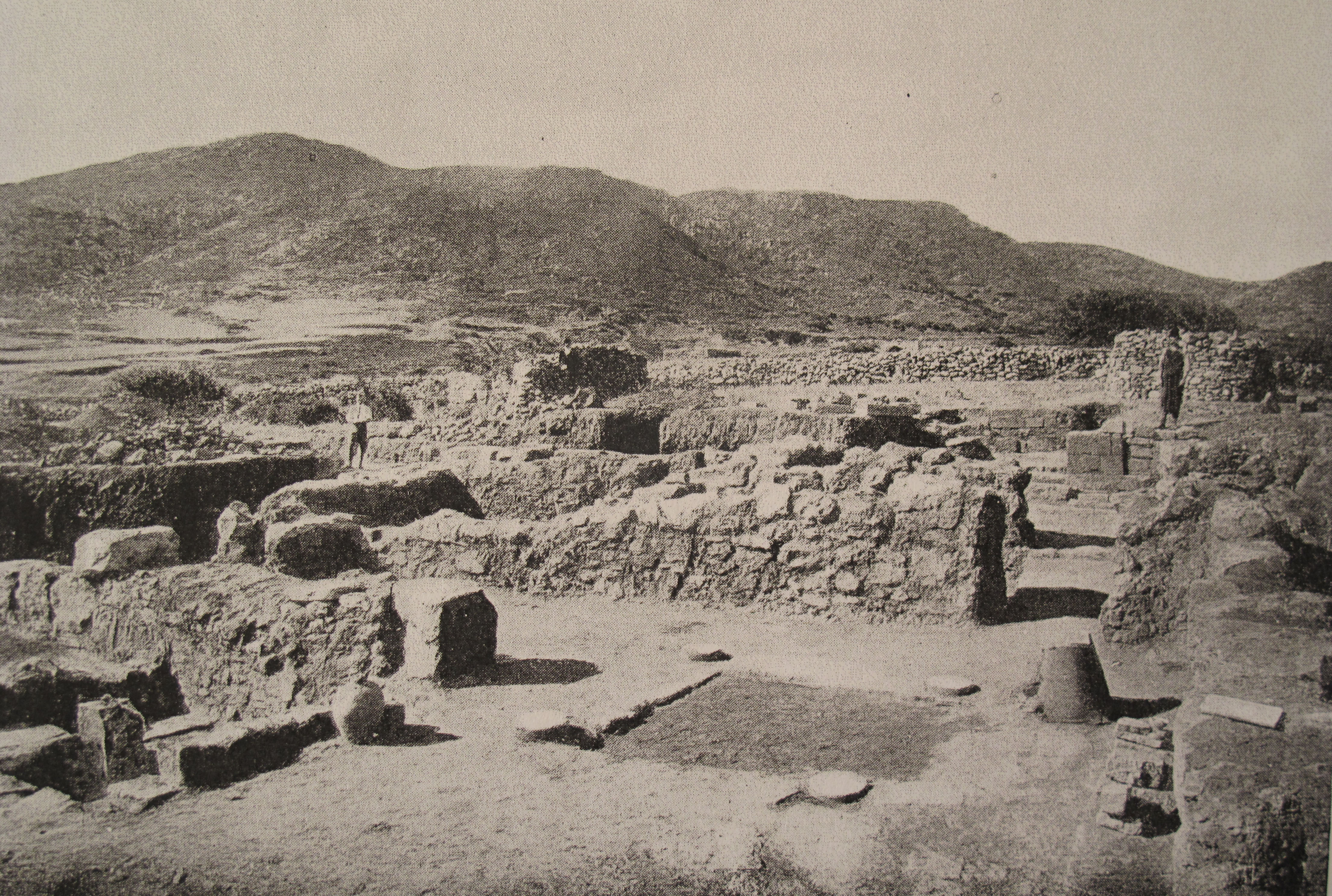 Minoische Ruinen in Roussolakkos. Ausgrabung der Britischen Schule der Archäologie im Jahr 1902.